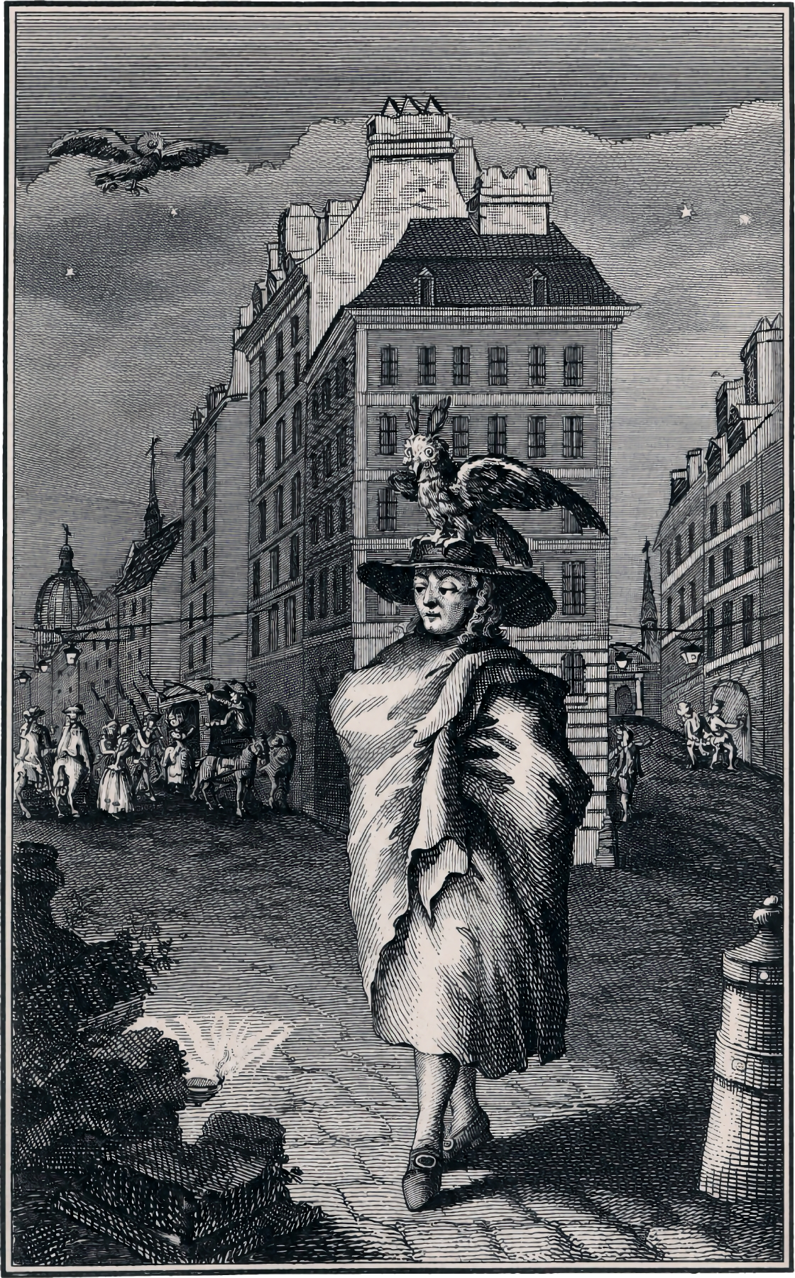 Illustration of Les Nuits de Paris, ou le Spectateur nocturne by Nicolas Edme Restif de La Bretonne (1734-1806)